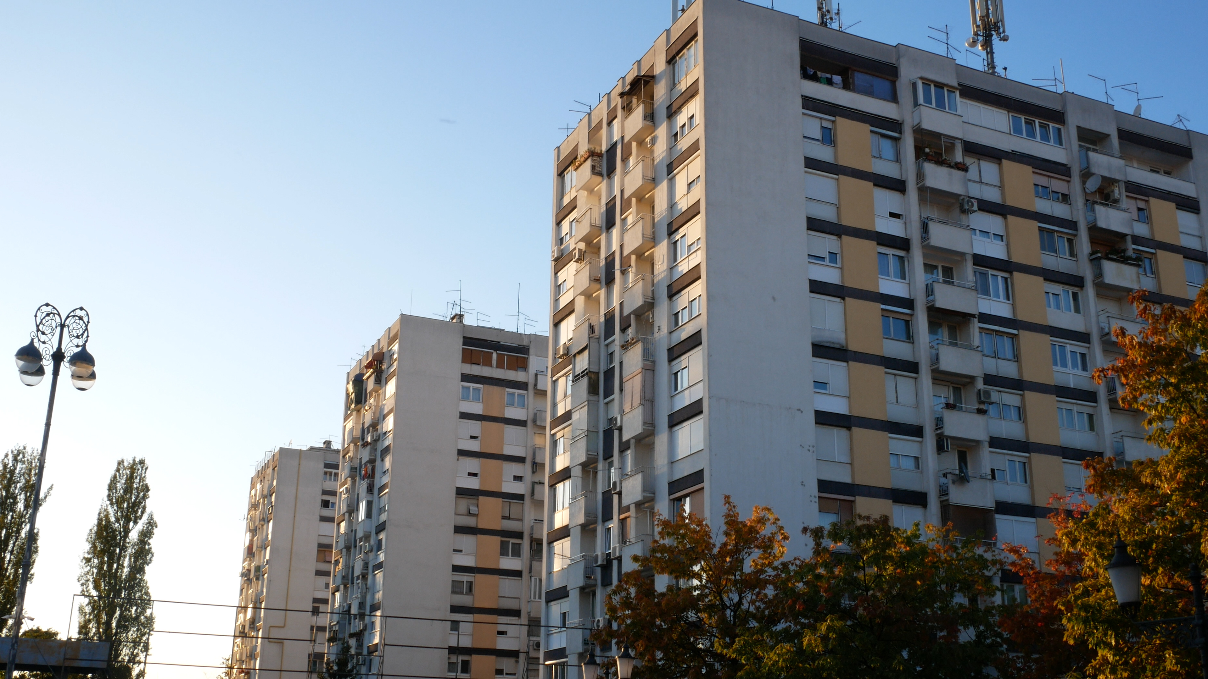 Neboderi u centru